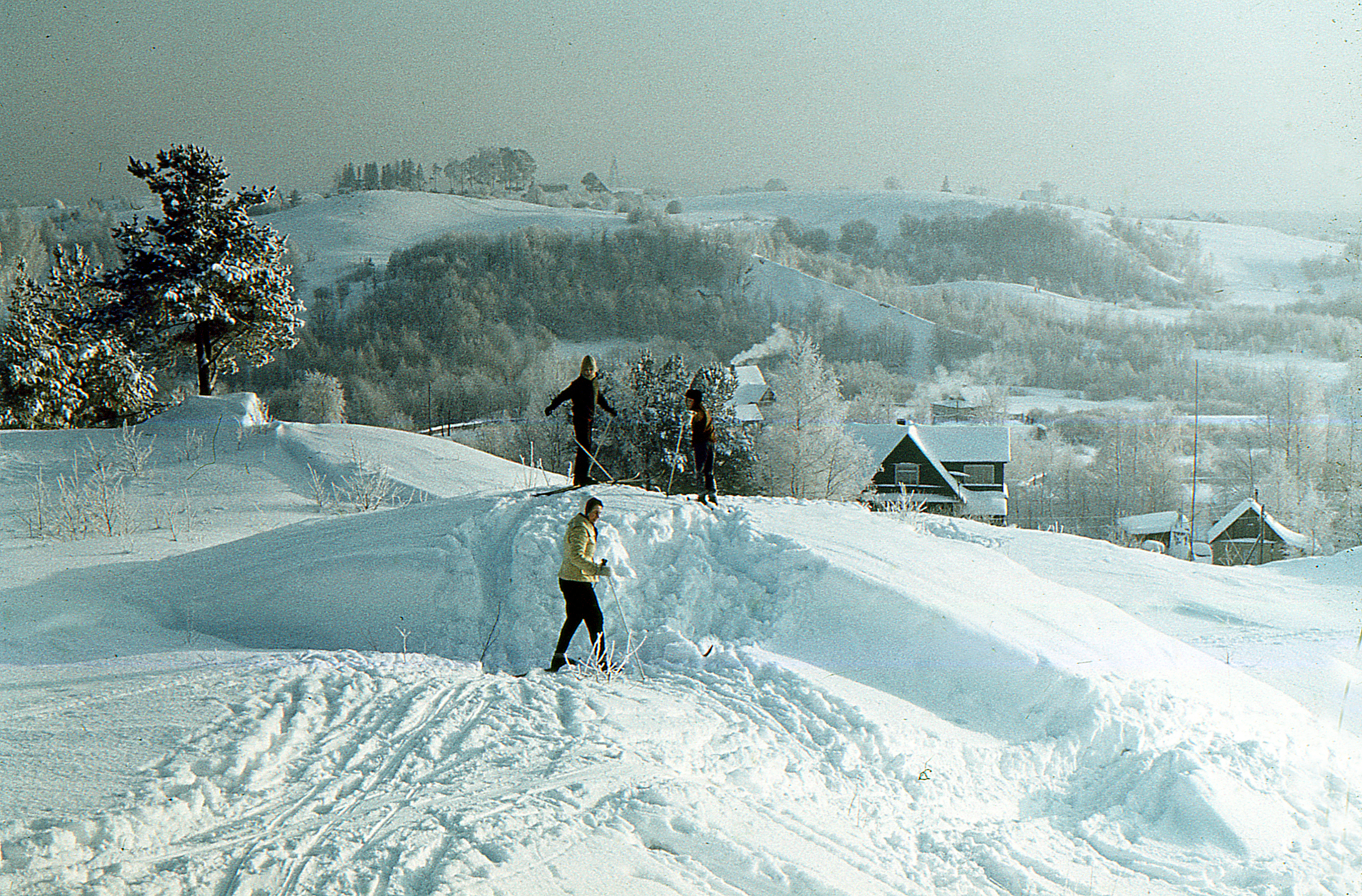 Зима. Сярьги под Петербургом